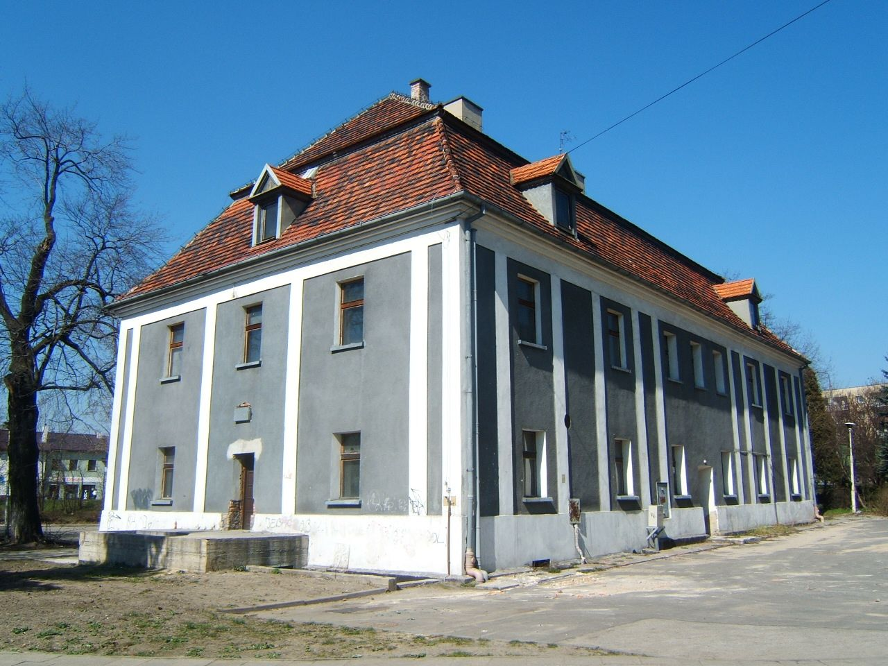 Dawny pałacyk Donnersmarcków w Halembie